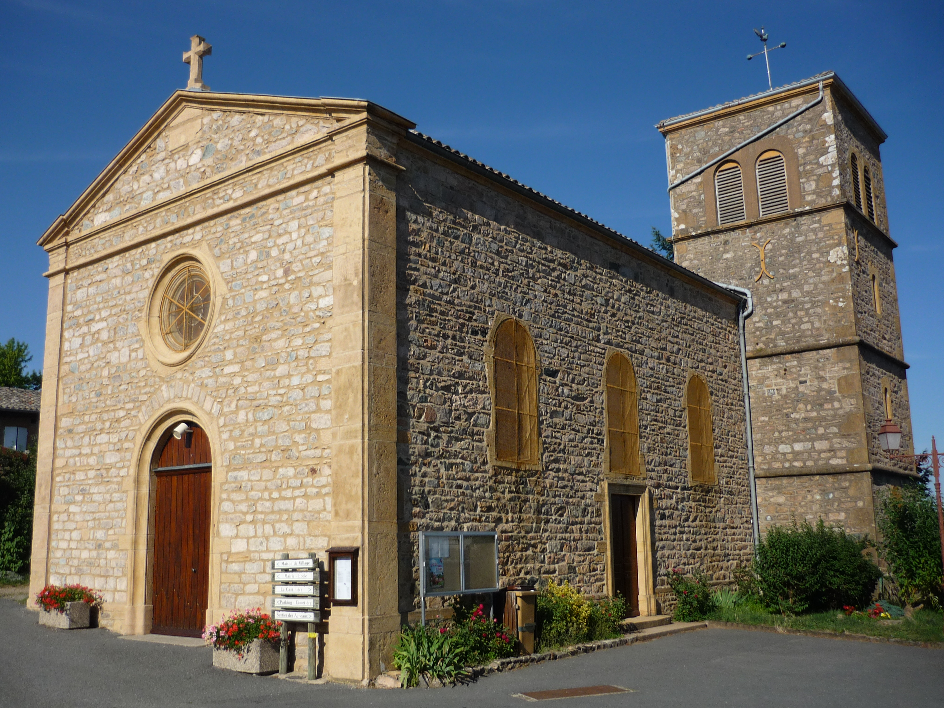 Église de Saint-Cyr-le-Châtoux, dans le département du Rhône